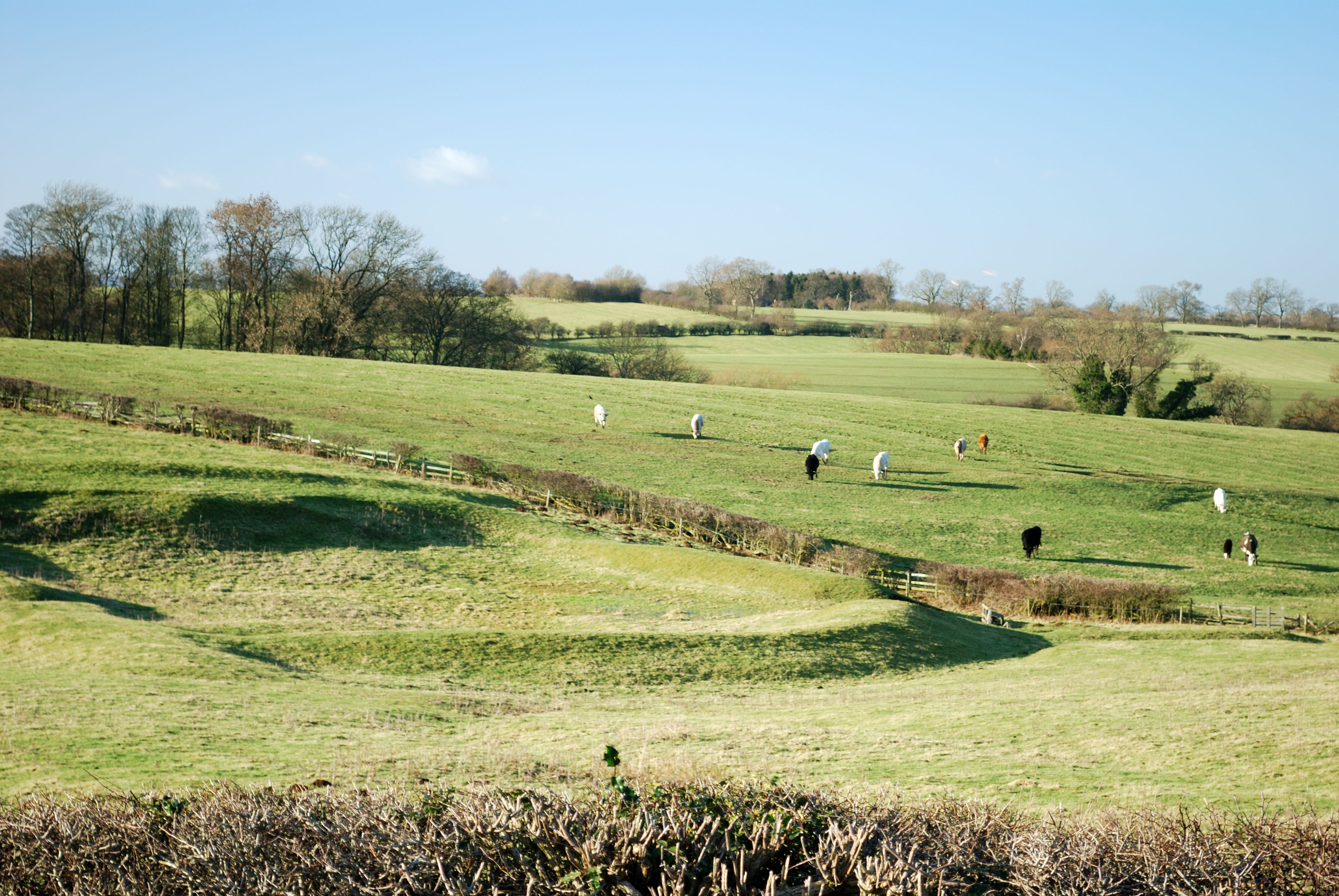 Cold Newton deserted medieval village